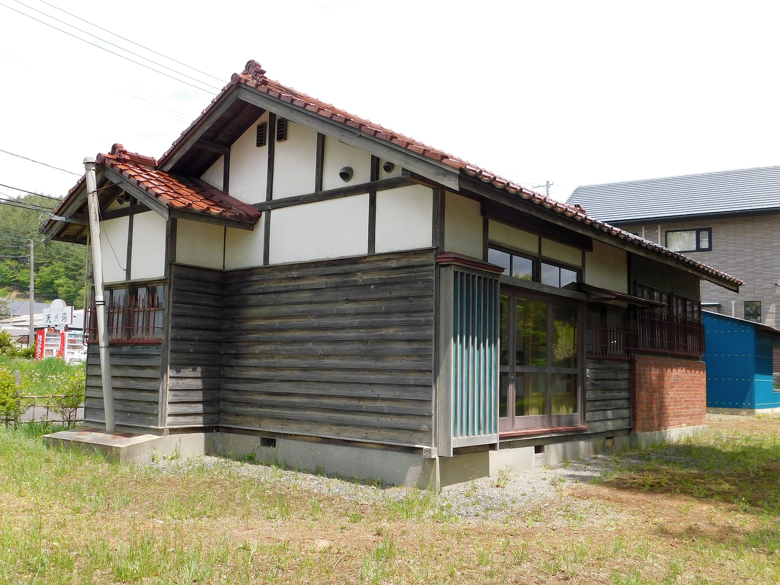 岩手県遠野市にある加守田章二の旧居